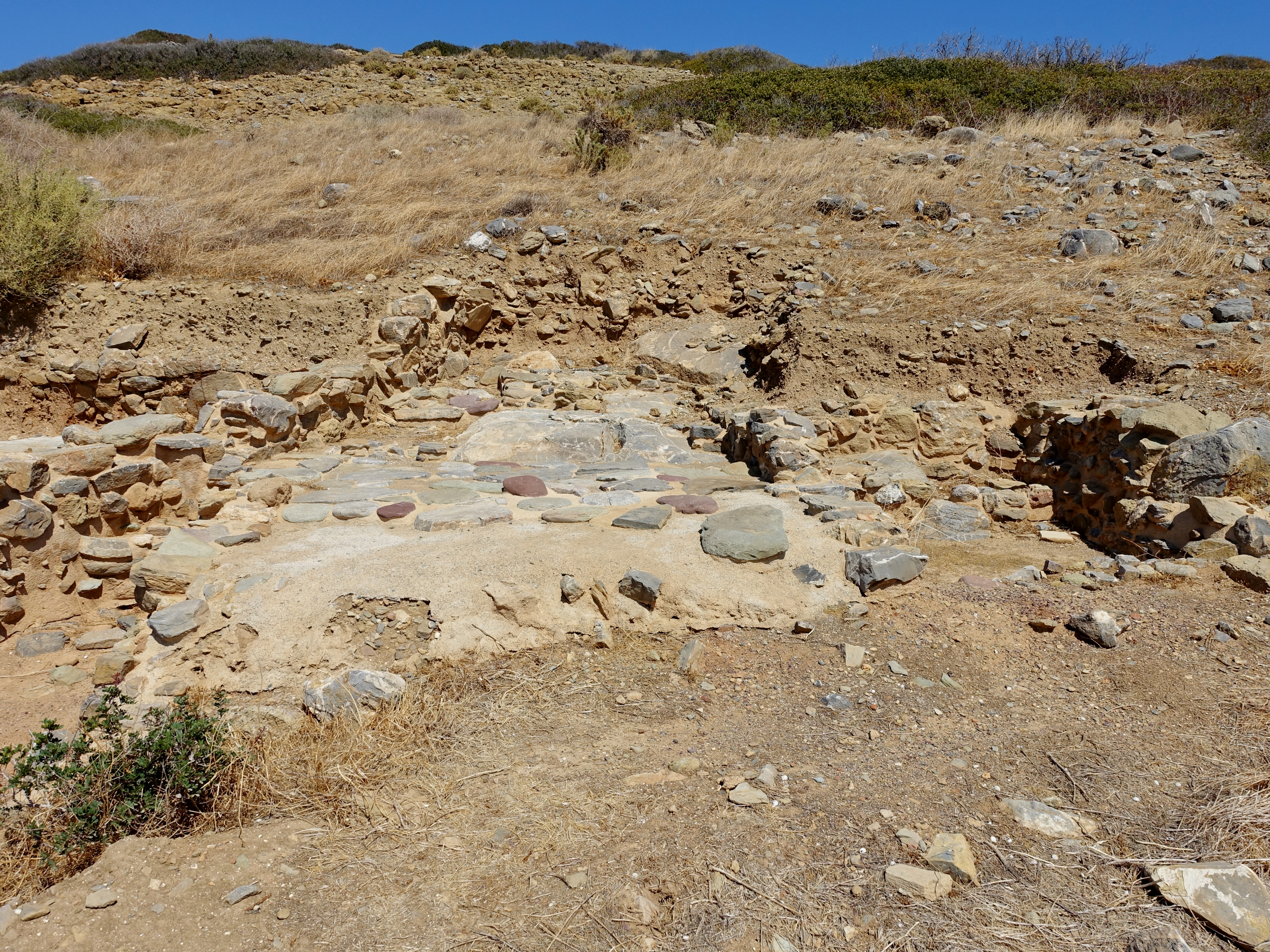 Ausgrabungsstätte auf der Insel Agios Nikolaos (Άγιος Νικόλαος) vor Mochlos (Μόχλος), Kreta, Griechenland